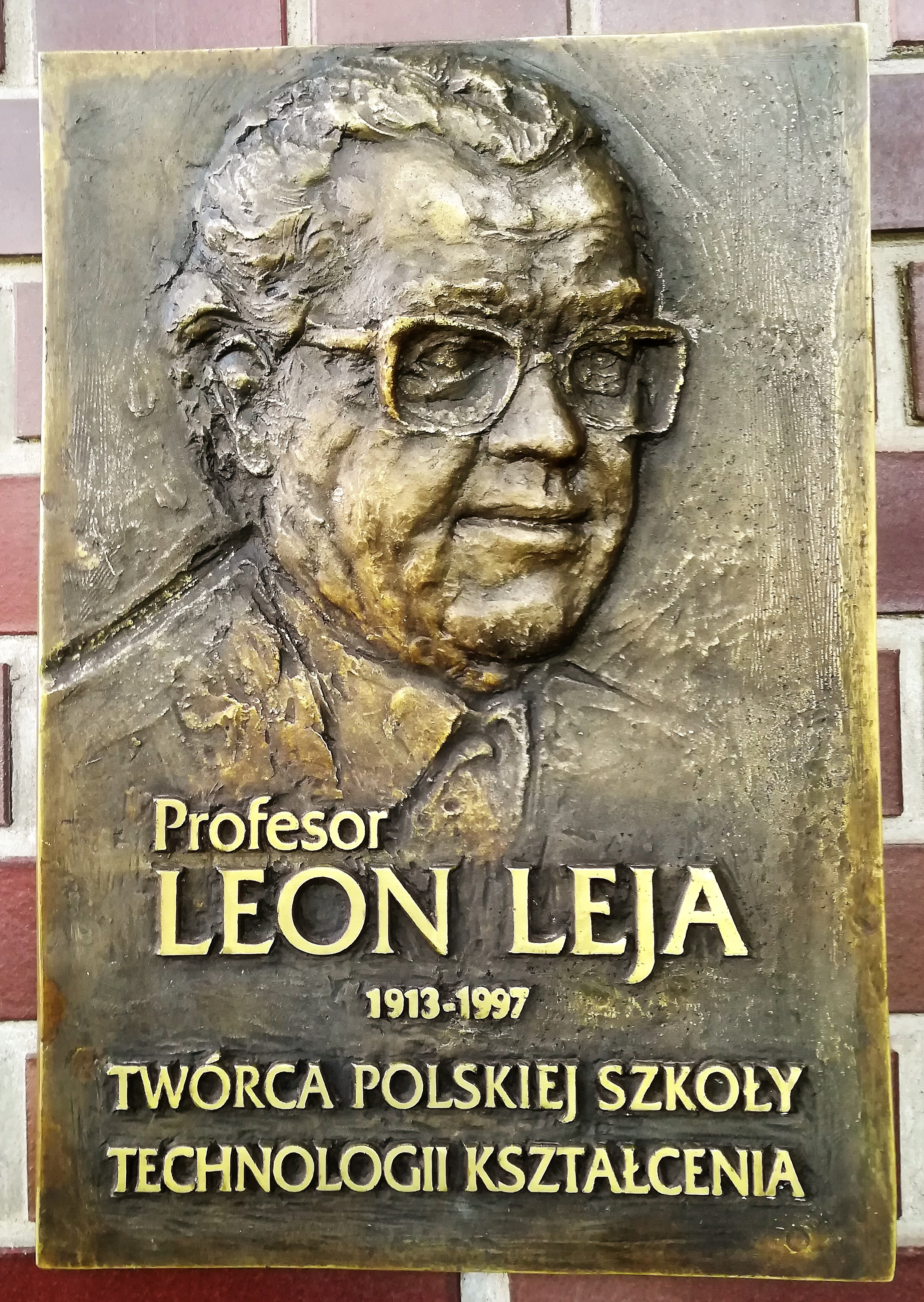 Tablica pamiątkowa w kolegium Znanieckiego w Poznaniu.